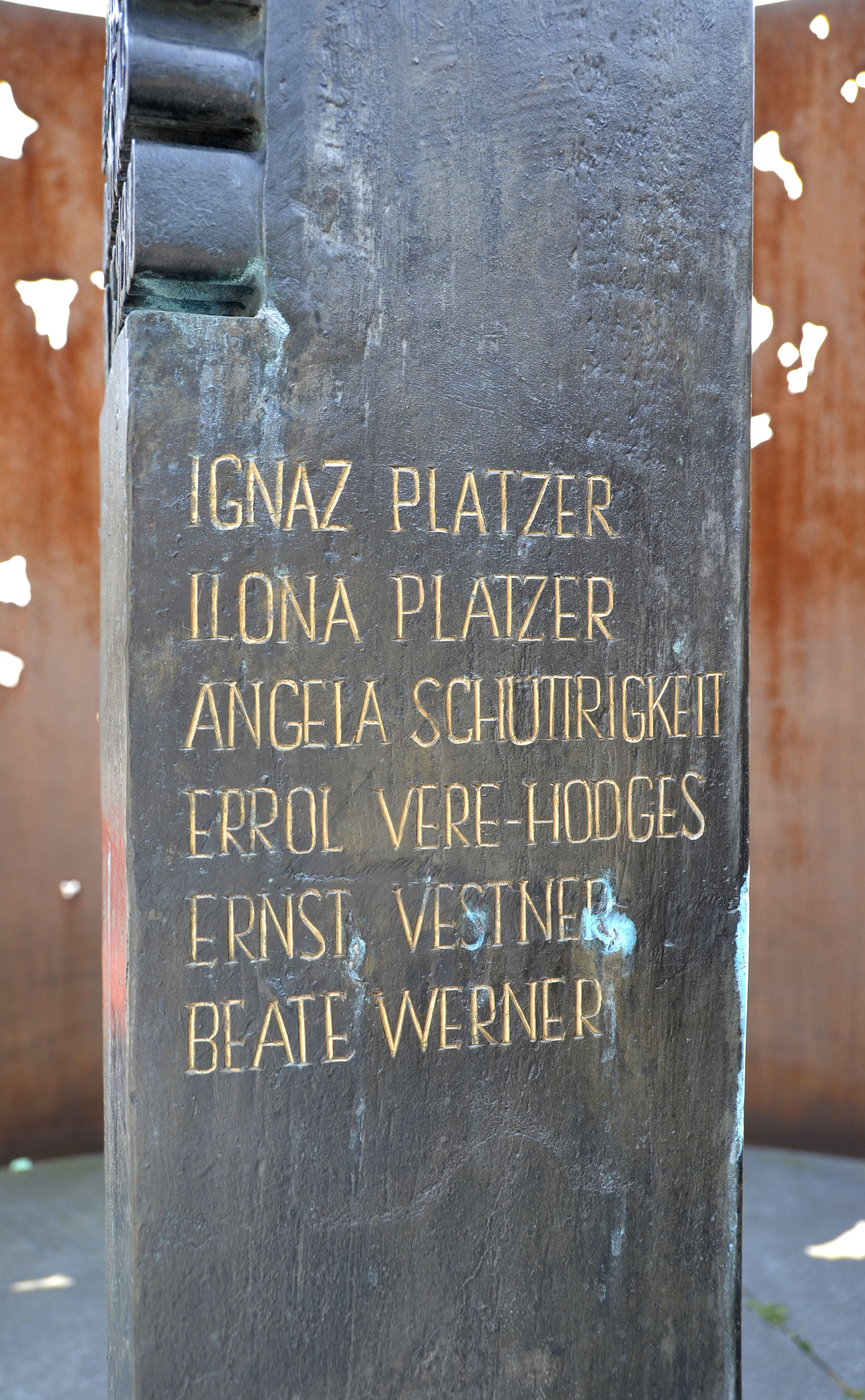 Das neue Oktoberfestattentat-Denkmal am Ort des Anschlags. Aufgelistet sind auf zwei Seiten der Stele die Opfer des Attentats.